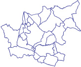 División municipal de La Siberia